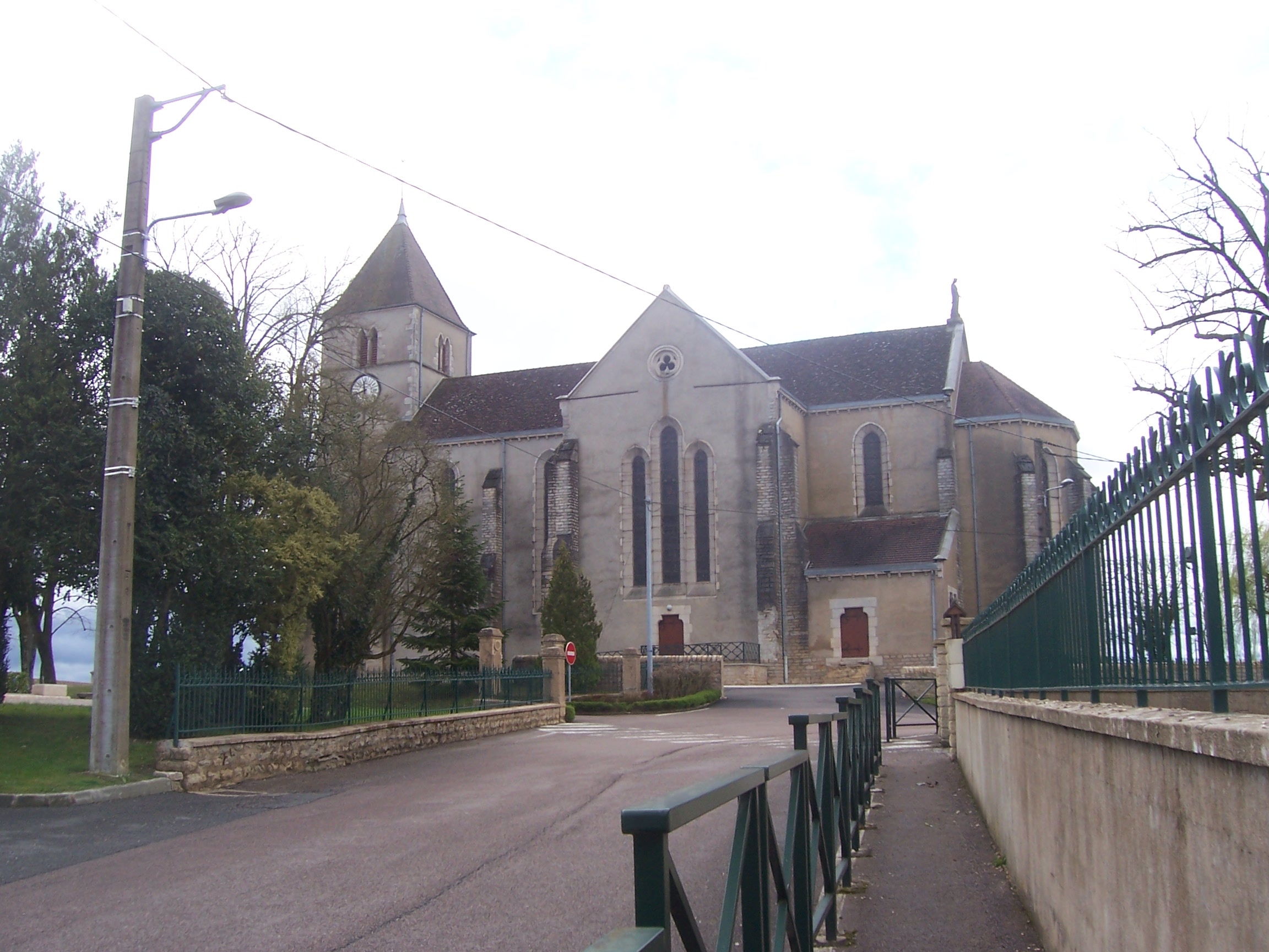 Eglise de Branges